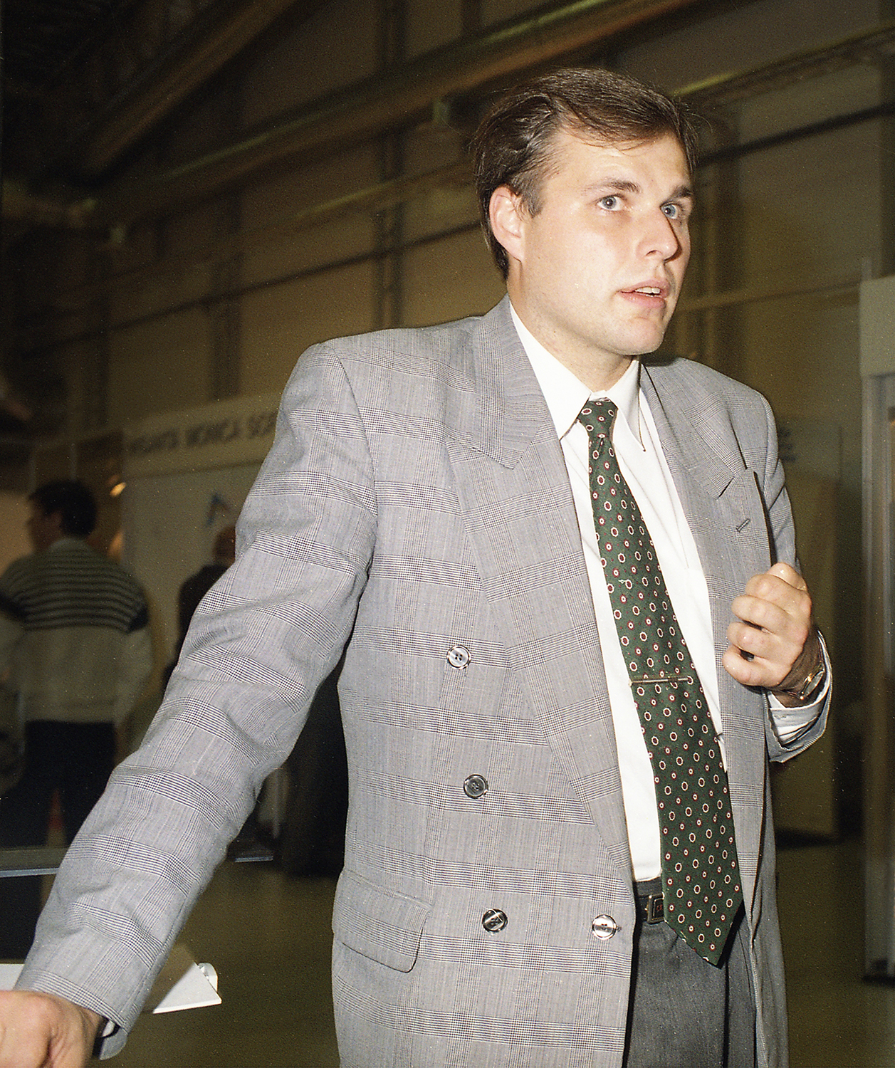 Valdo Kalm, Eesti tippjuht ja ühiskonnategelane 96